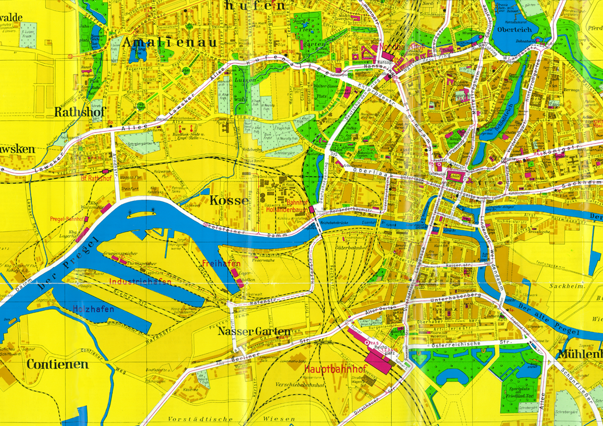 Der Pregel mit den drei neuen Hafenbecken in Königsberg i. Pr.. Zu erkennen sind auch der Hauptbahnhof und der Nordbahnhof, die beiden Eisenbahnbrücken über den Pregel sowie die Anfänge der Bahnstrecken nach Berlin, Pillau, Cranz, Labiau/Tilsit und Rastenburg/Lyck. Rechts von der Bildmitte ist die Kneiphofinsel mit dem Hundegatt.